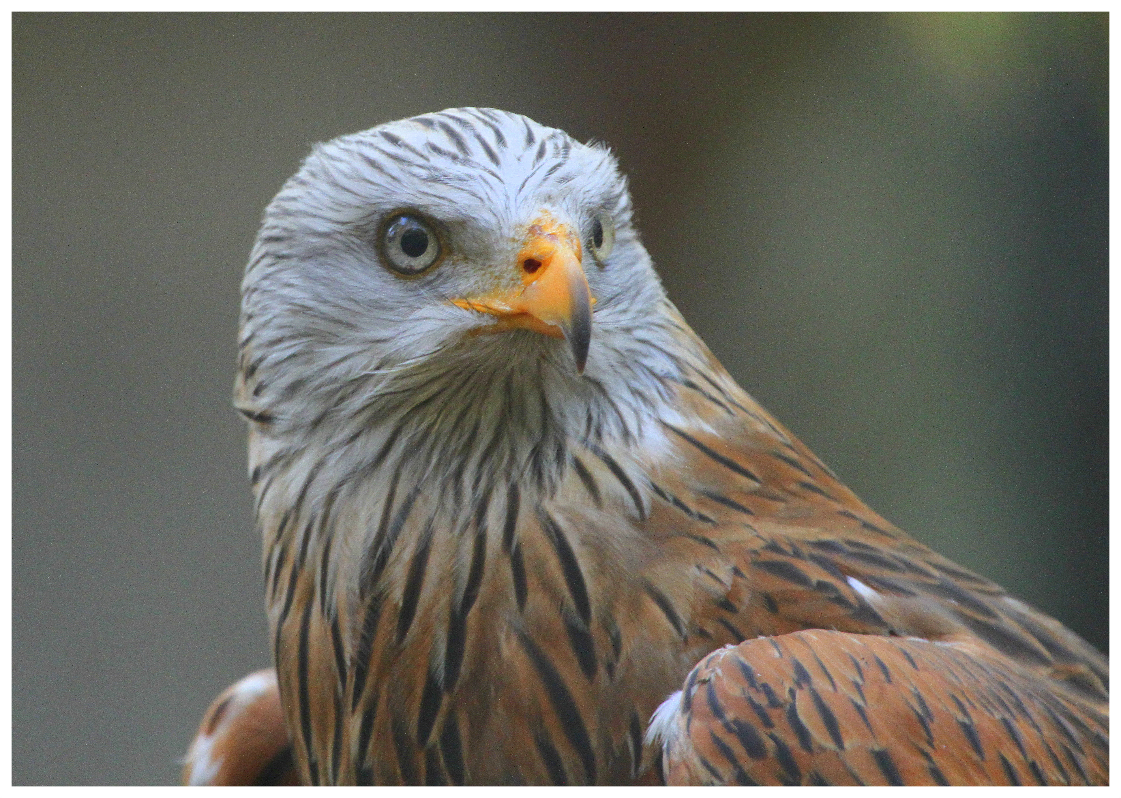 Rotmilan